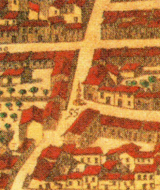 Topografía de la Villa de Madrid descrita por Don Pedro Texeira en 1656, en la cual se demuestran todas las calles al largo y ancho de cada una de ellas, las rinconadas y lo que tuercen las Plazas, fuentes, jardines y huertas con la disposición que tienen las parroquias, Monasterios y Hospitales están señalados sus nombres con letras y números que se hallaran en la tabla y los demás edificios, torres y delanteras de las casas de la parte que mira al Mediodía están sacadas al natural que se podrán tocar las puertas y ventanas de cada una de ellas.